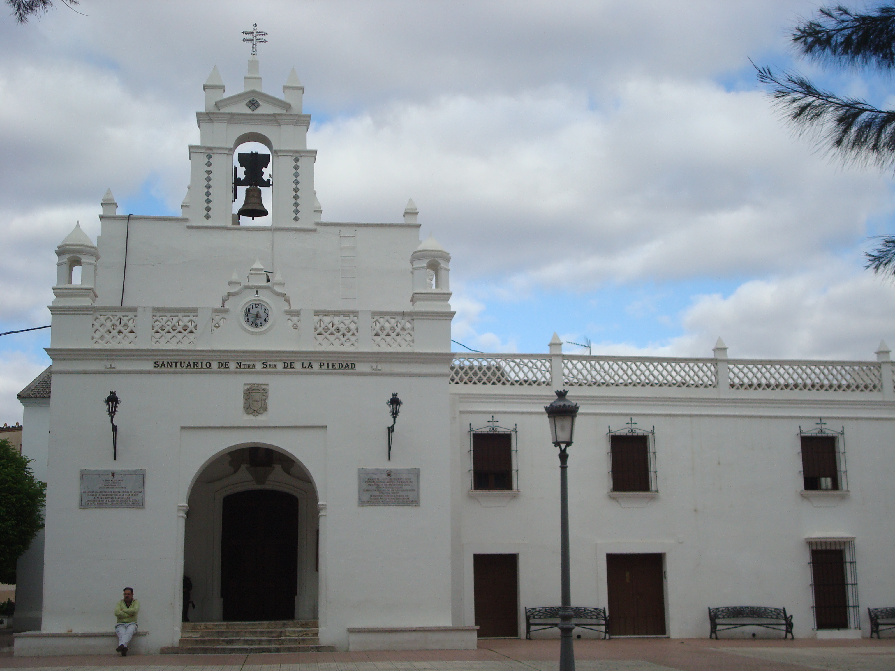 Almendralejo - 013